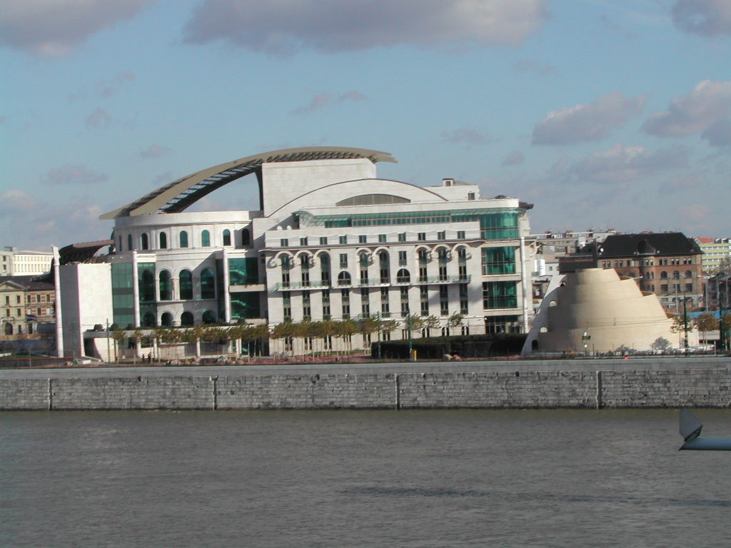 Personal picture